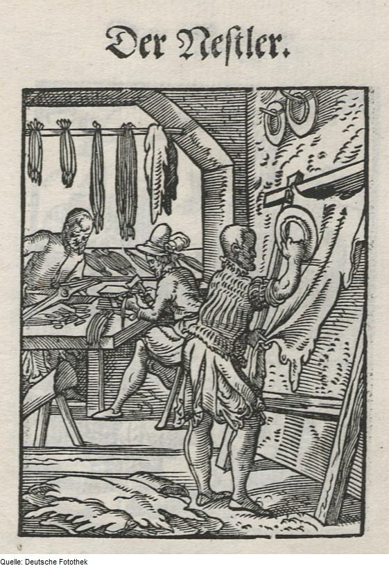 Original image description from the Deutsche Fotothek Ständebuch & Handwerk & Nestler & Haftelmacher